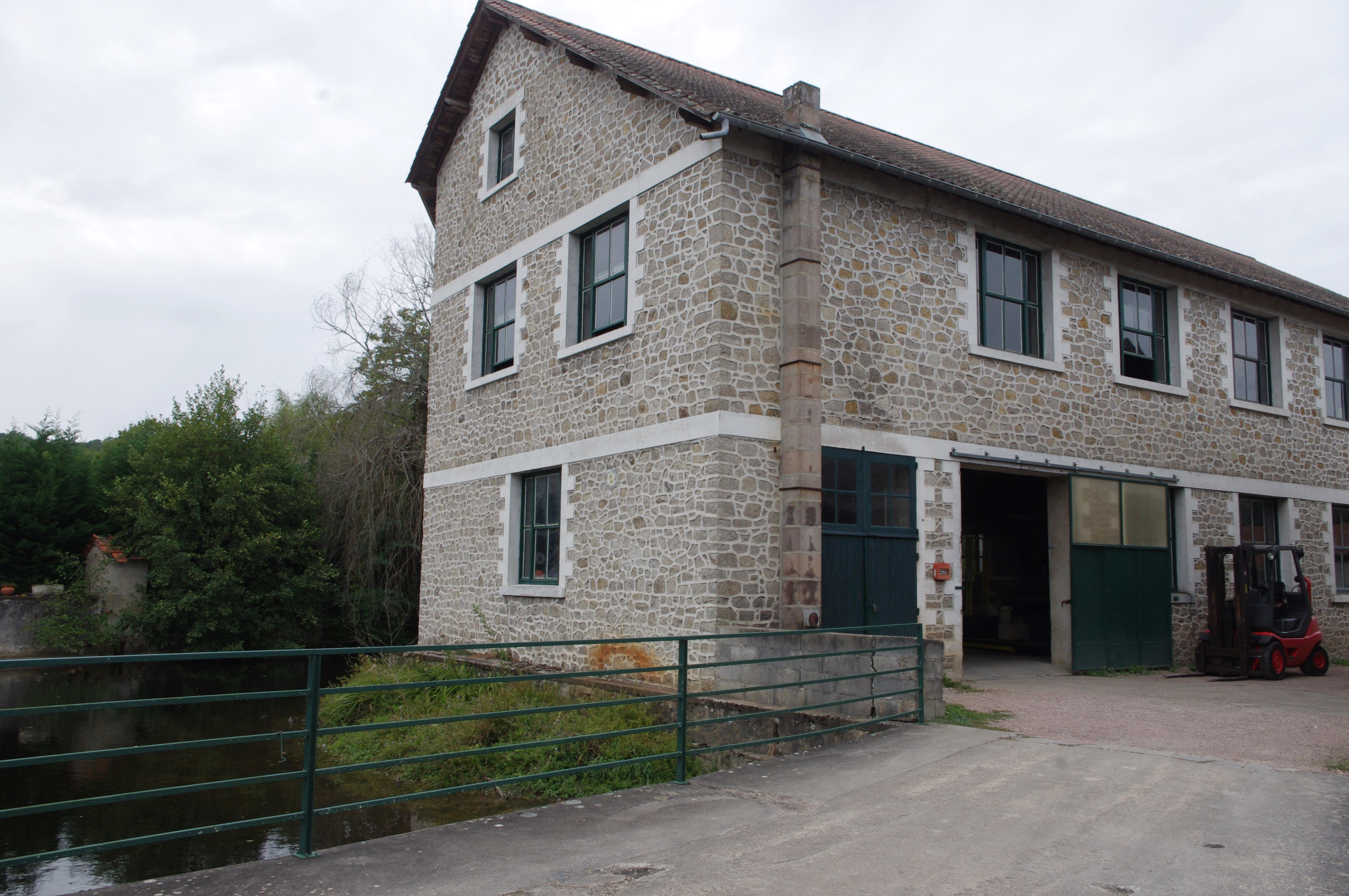 Tannerie de Saint Pardoux la Rivière, Dordogne, France.